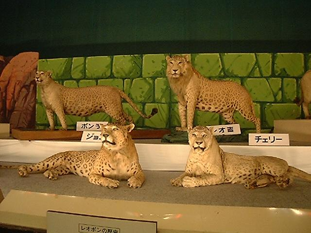 阪神パーク展示 レオポンの剥製